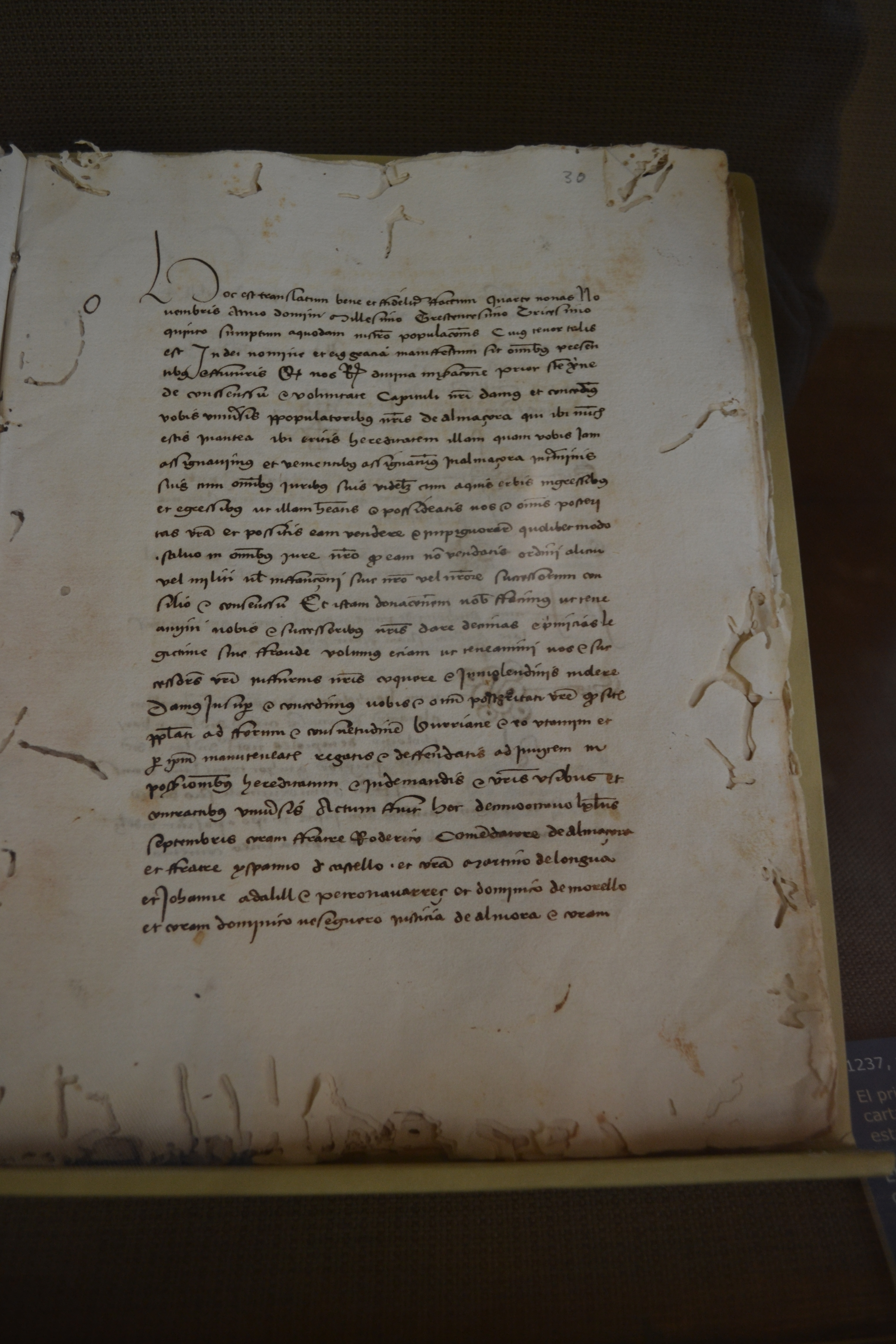 El prior de l'Hospital de Santa Crsitina de Somport (osca) atorga carta de poblamente al lloc d'Almassora per a tots els pobladors allí establerts, a fur de Saragossa (15 d'agost de 1237). ARV: Batlia, lletra P, expedient núm. 15, pàgina dreta (cópia de 4 nonas de noviembre de 1335). Arxiu del Regne de València.